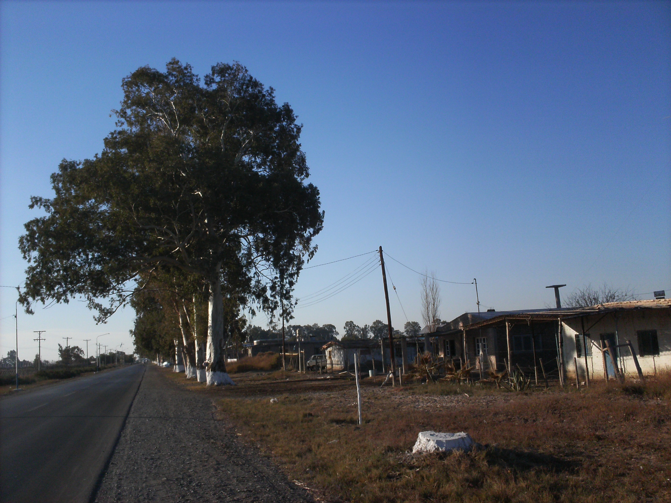 la villa en toda su extencion sobre la ruta provincial